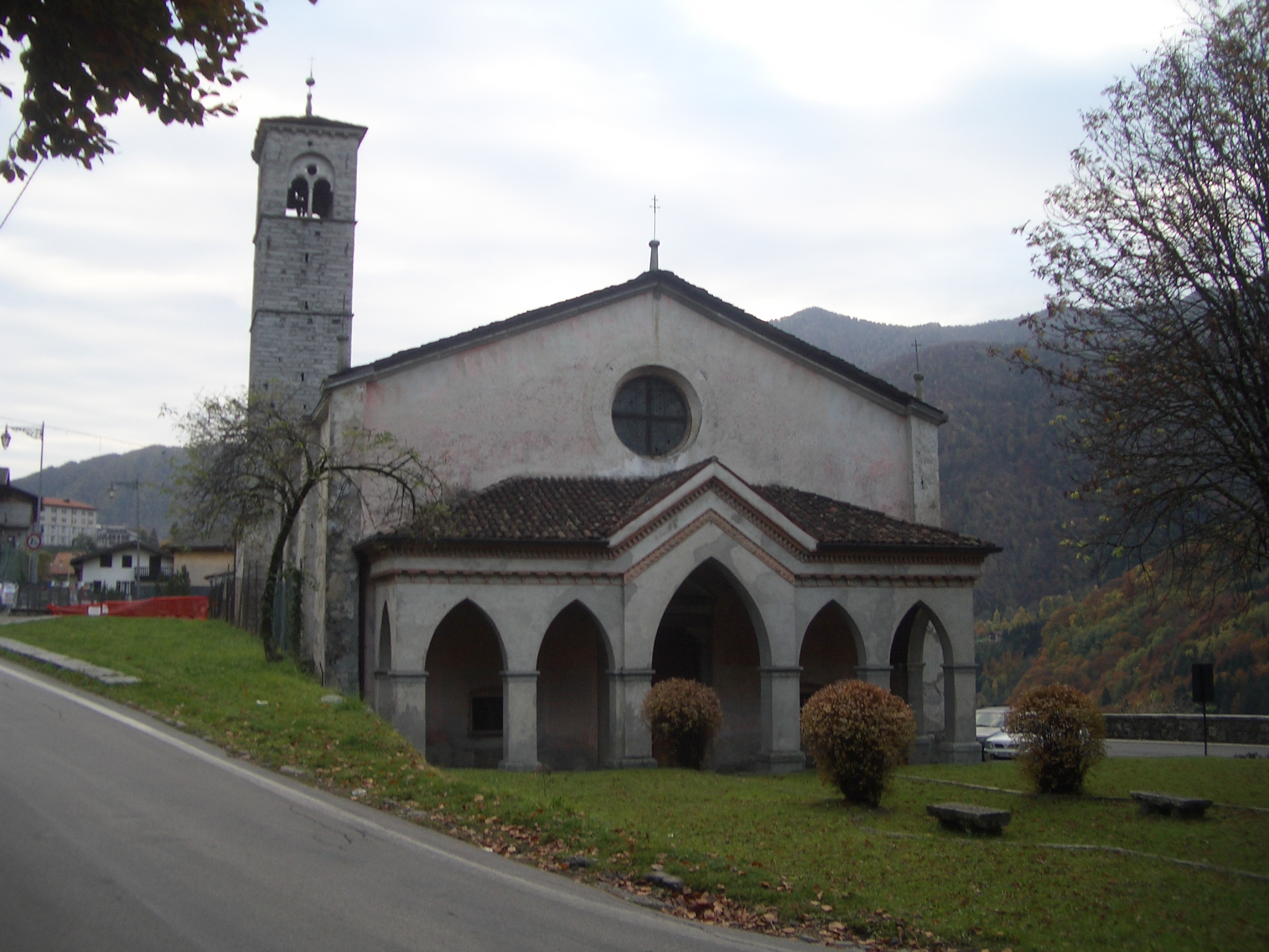 San Rocco church, Bagolino, Brescia, Italy